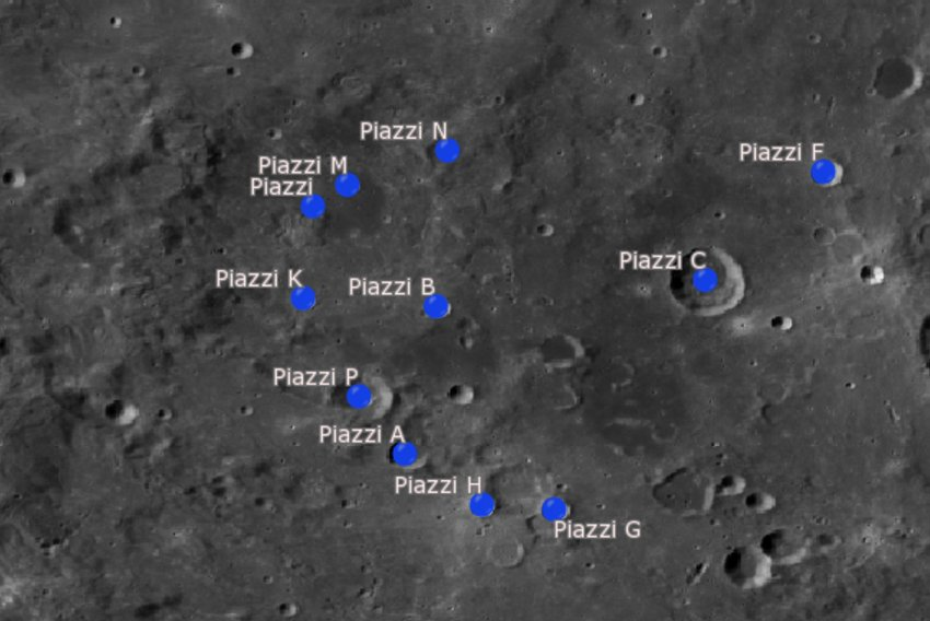 Cráter lunar Piazzi. Cráteres satélite. (Imagen LRO)